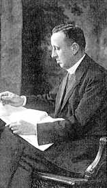 Matija Slavič slovenian politican and theologist